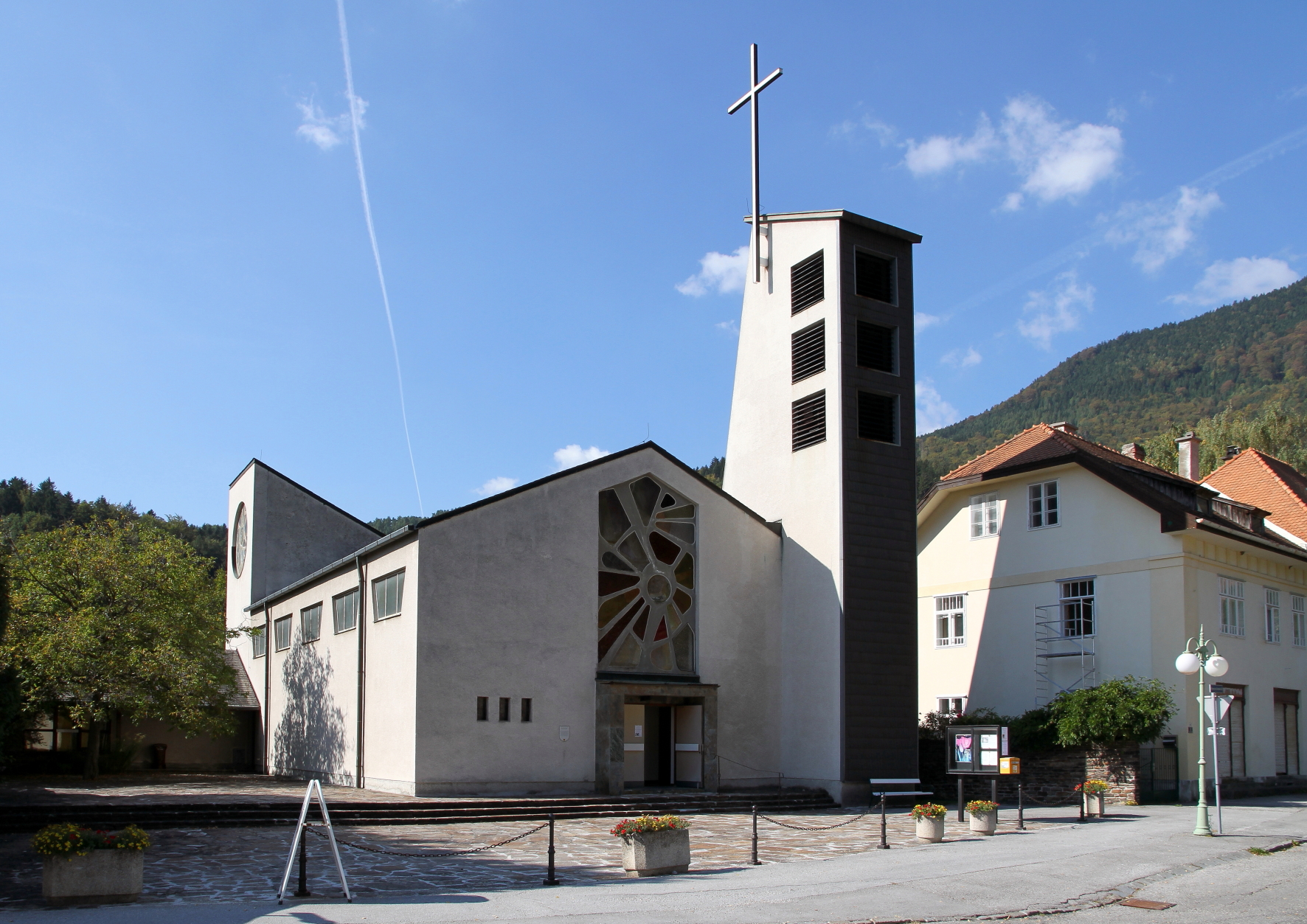 Die Filialkirche hl. Josef in Hirschwang, ein Ortsteil der niederösterreichischen Marktgemeinde Reichenau an der Rax. Nach Plänen des Architekten Josef Wöhnhart errichtet und 1960 fertiggestellt.